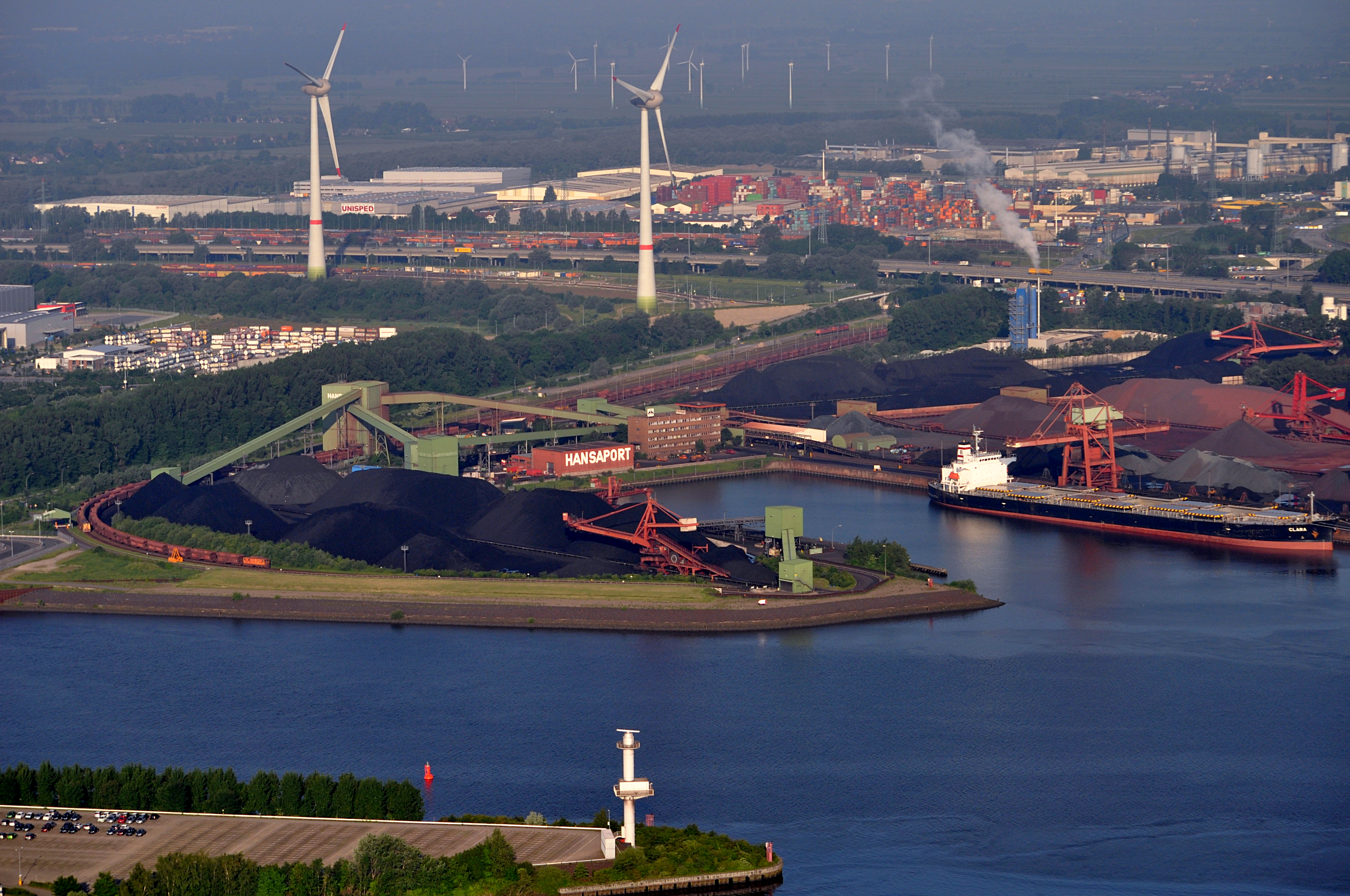 Hansaport in Hamburg-Waltershof.